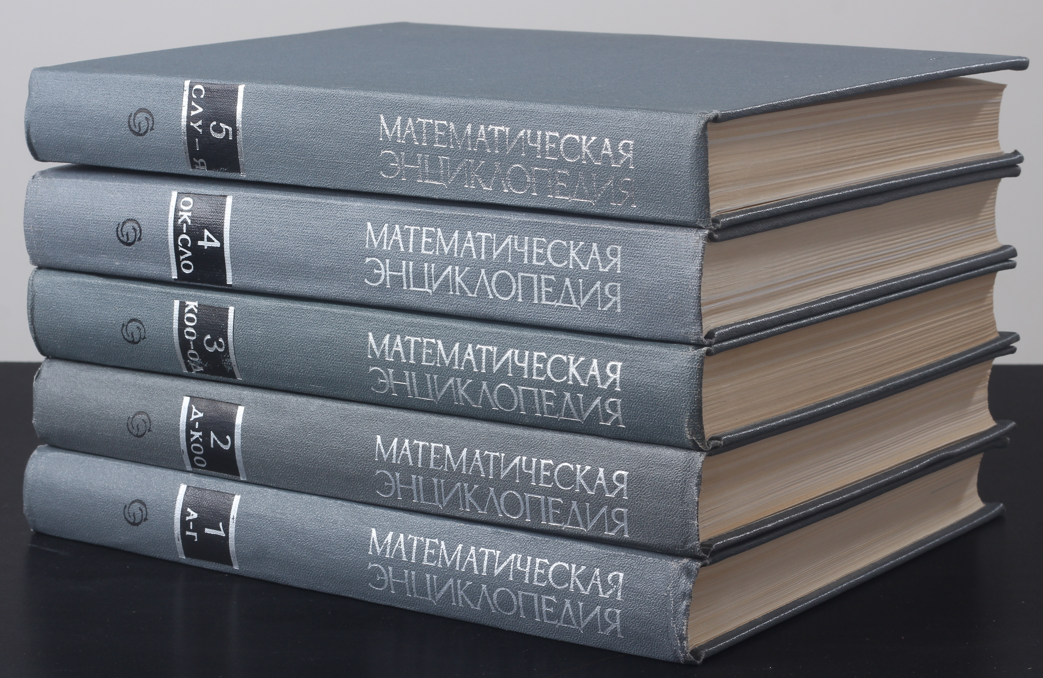 Математическая энциклопедия в пяти томах, издание 1977 года.